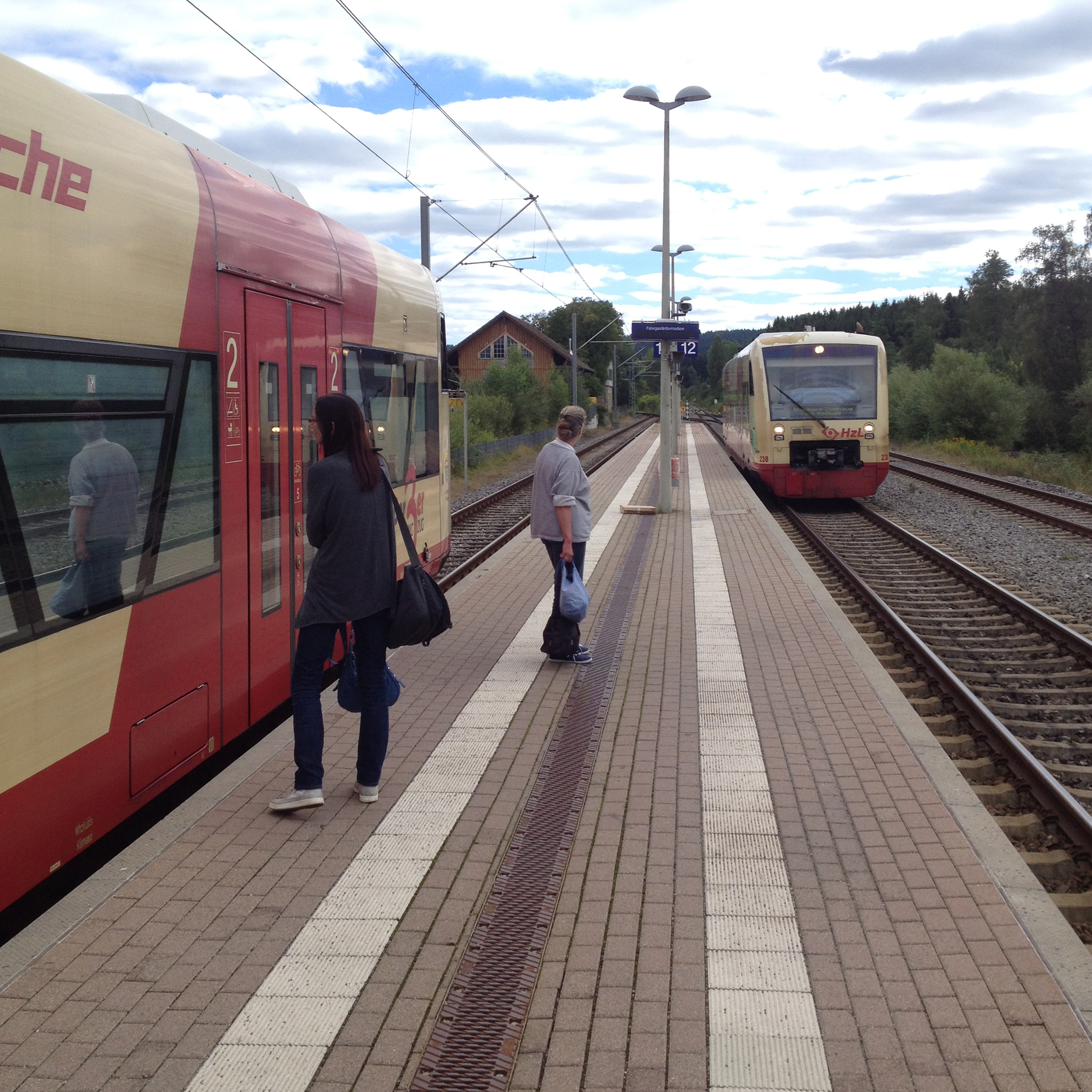 Trossingen Bahnhof (ehemals Staatsbahnhof) mit zwei Stadler Regio-Shuttles der Hohenzollerischen Landesbahn.